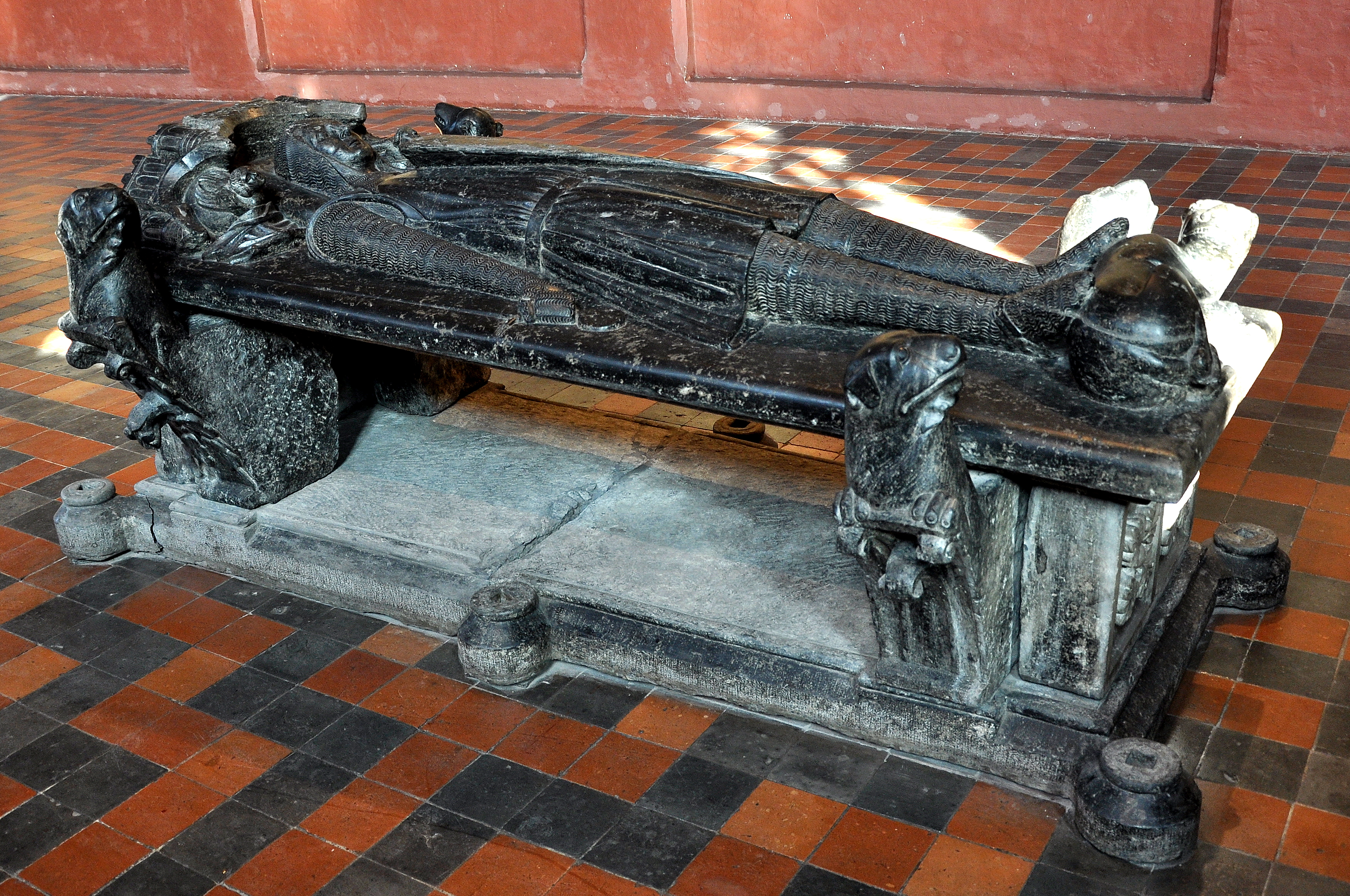 Grafmonument van Hugo II, burggraaf van Gent (overleden 1232) in het Stadsmuseum (STAM) te Gent